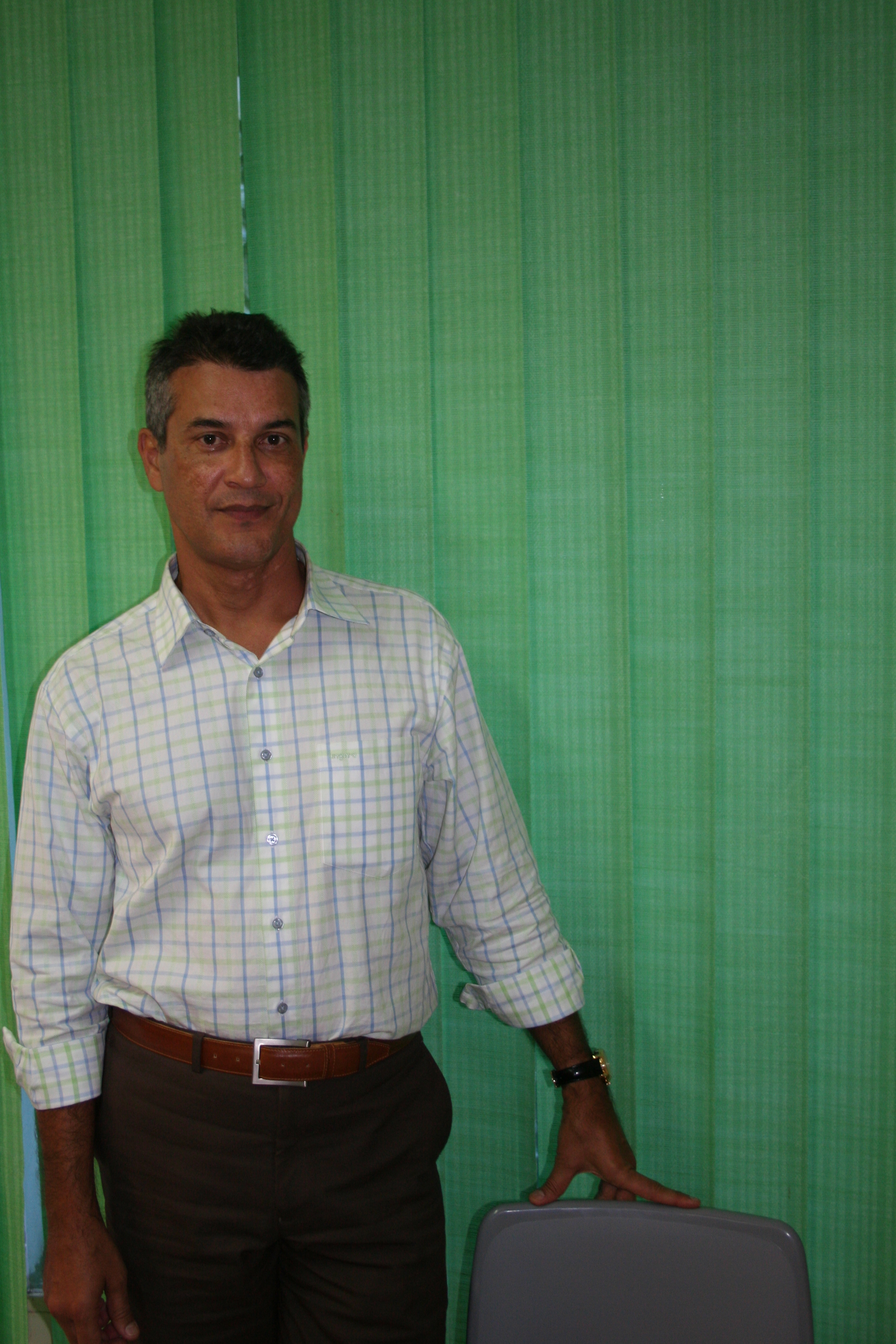 L'homme politique réunionnais Ibrahim Dindar dans les locaux de l'Union centriste et libérale.